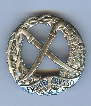 Distintivo CSIR. Sono il proprietario del distintivo Non metto in dubbio che il legittimo proprietario del distintivo abbia combattuto nel C.S.I.R. poi ARM.I.R. infatti questo distintivo è stato distribuito ai reduci ARM.I.R.poiché gli appartenenti al C.S.I.R. fu distribuita la "CROCE DI GHIACCIO" una medaglia a croce smaltata o dipinta in bianco con inciso sul retro C.S.I.R. luglio941 luglio942 BUG DON DIJEPER DONETZ il nastro per metà nero e metà bianco entrambi i distintivi erano fabbricati dalla LORIOLI.